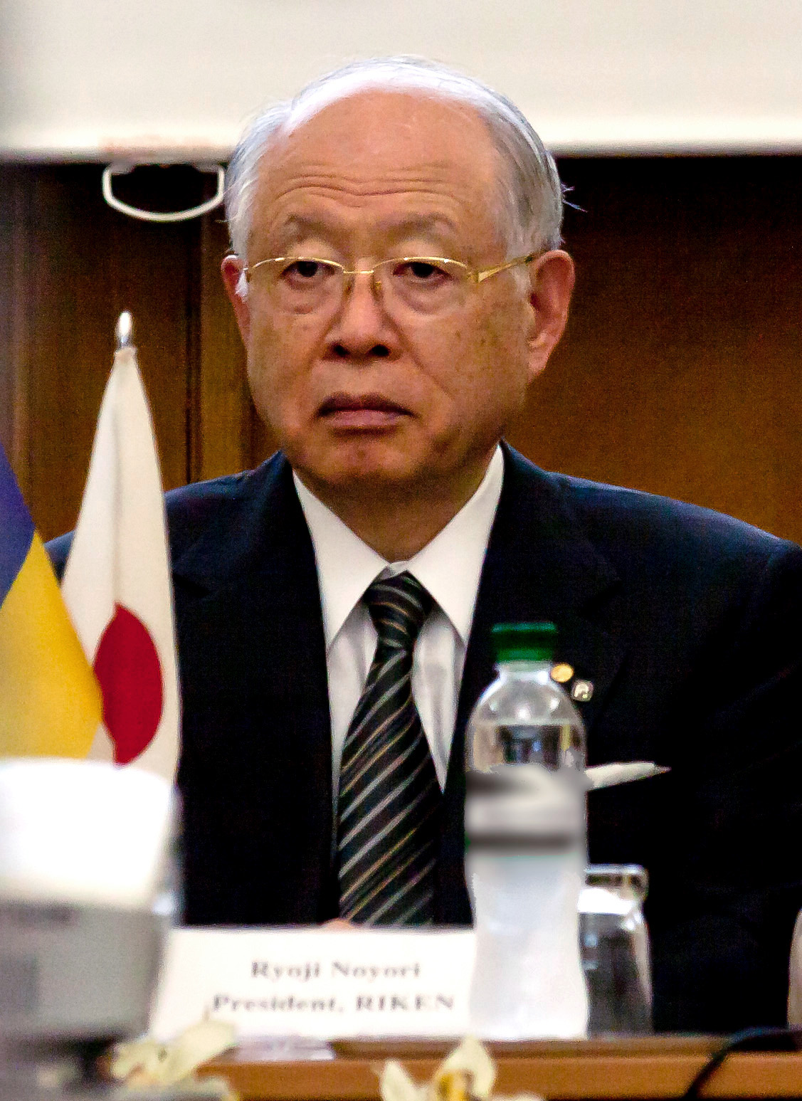 Професор Рьоджі Нойорі під час лекції в Києві